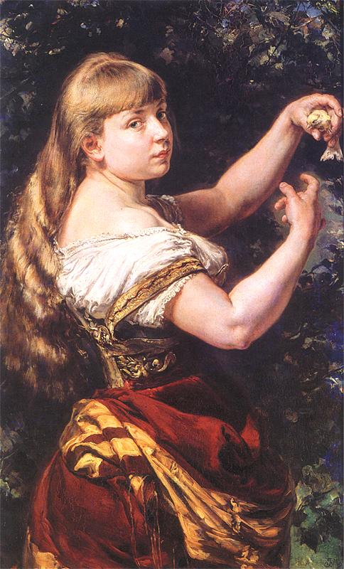 Beata Matejko z kanarkiem